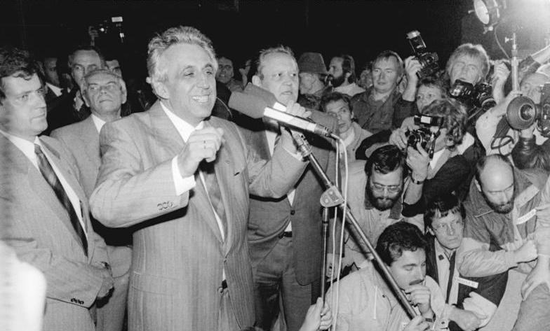 ADN-ZB Zimmermann 8.11.89 Berlin: Während der Kundgebung vor dem Gebäude des ZK der SED, an der viele Tausend Mitglieder Berliner Parteiorganisationen teilnahmen, hielt Egon Krenz (am Mikrofon), Generalsekretär des ZK der SED, eine kurze Ansprache.